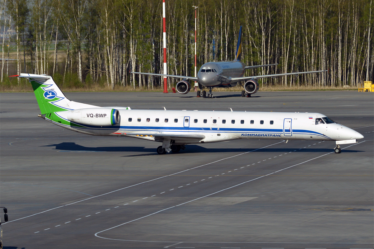 Komiaviatrans, VQ-BWP, Embraer ERJ-145LR